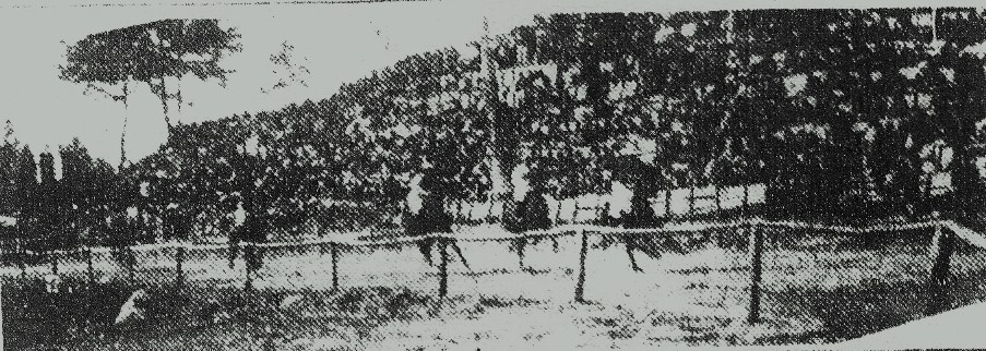 昭和9年4月30日頃に宮城県気仙沼市で行われた競馬の光景です。